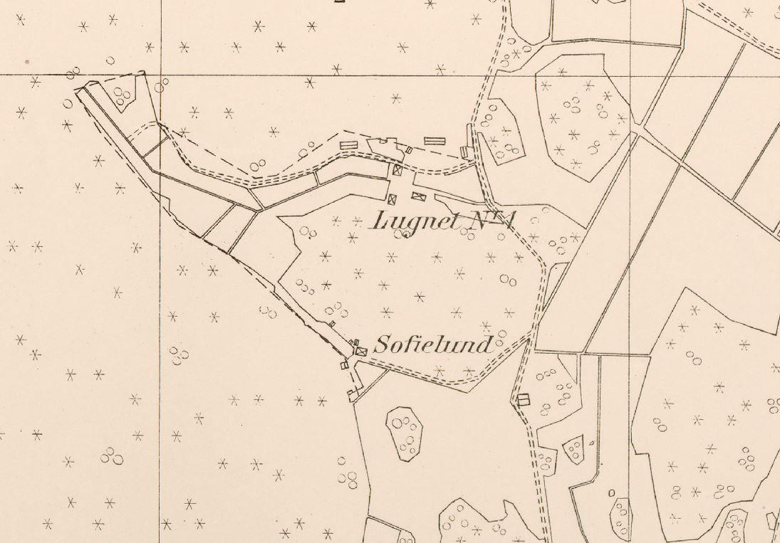 Torpet Lugnet i Hökarängen på 1926 års karta över Brännkyrka del 14 (Gubbängen, Tallkrogen, Herrängen och Örby)